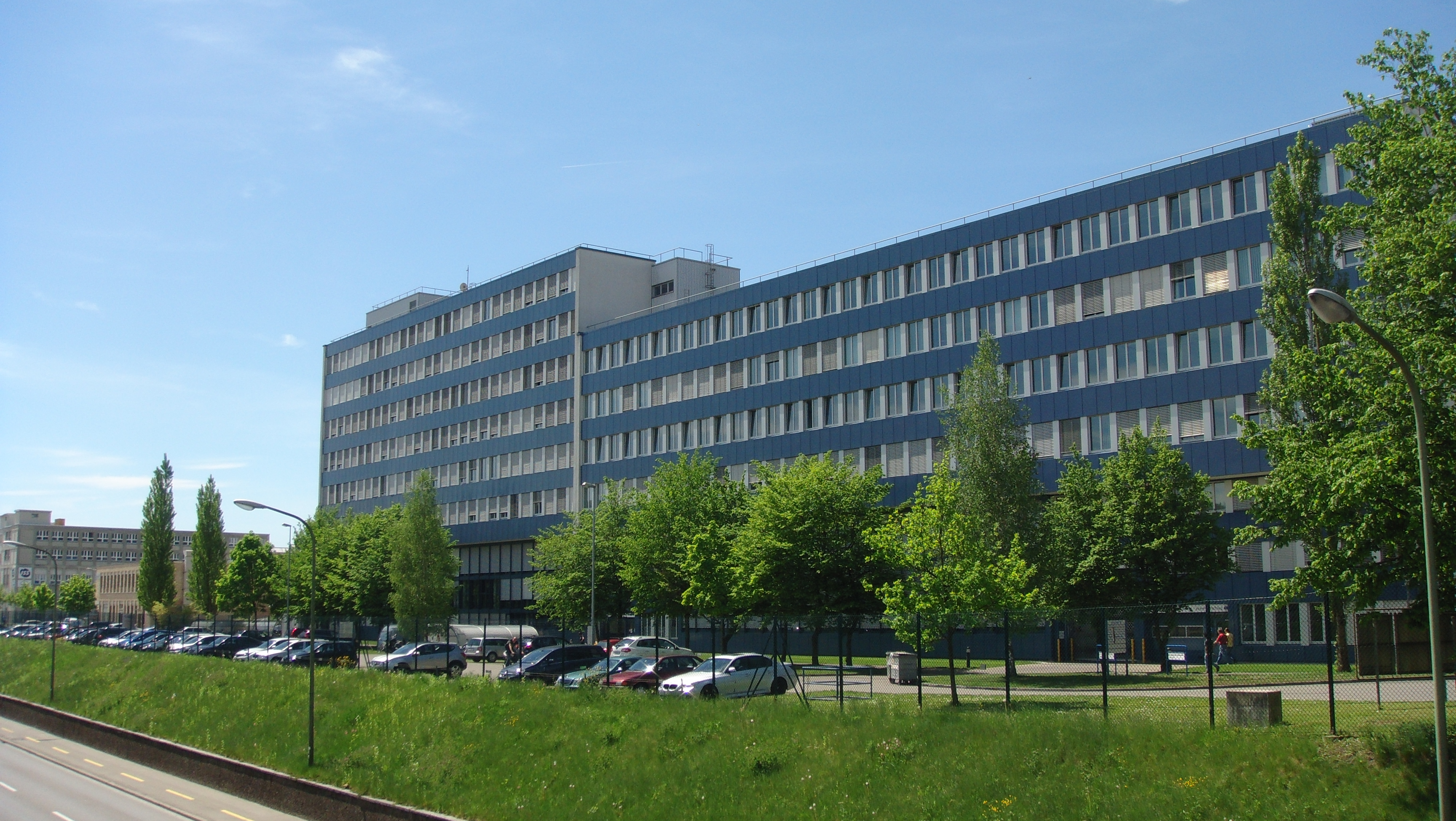 Industriegbäude in Winterthur-Neuhegi. Burckhardt Compression AG